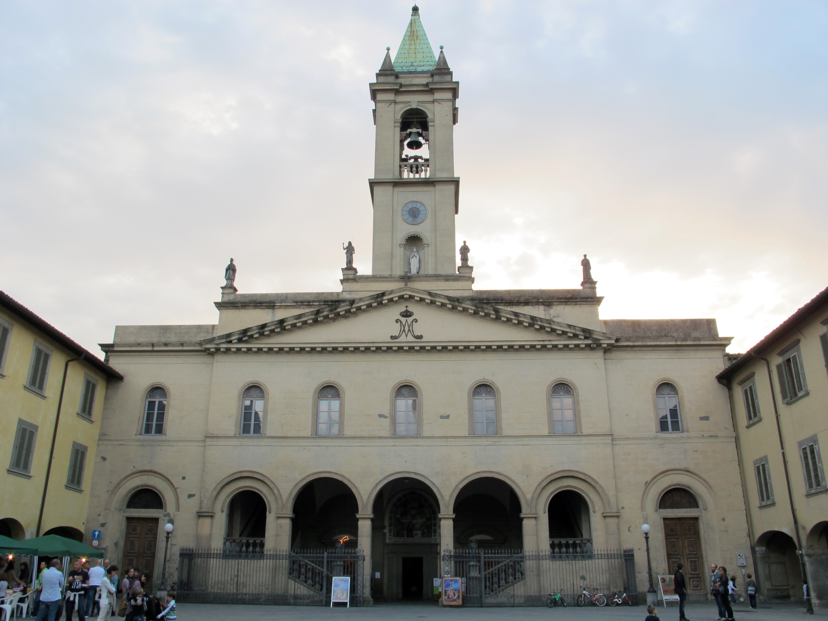 Madonna dell grazie (s. giovanni valdarno), ext